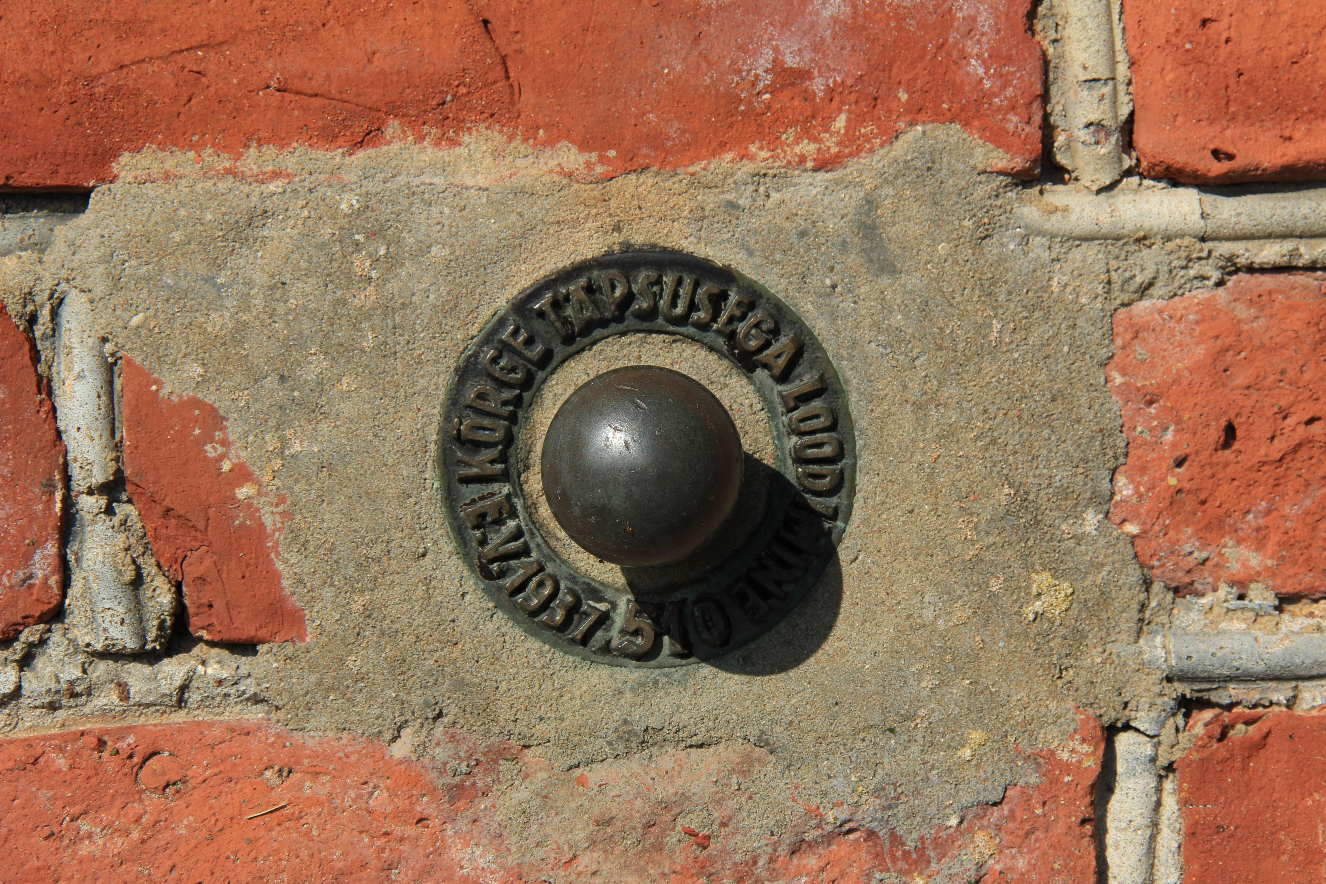 Kergu kiriku seinal olev reeper